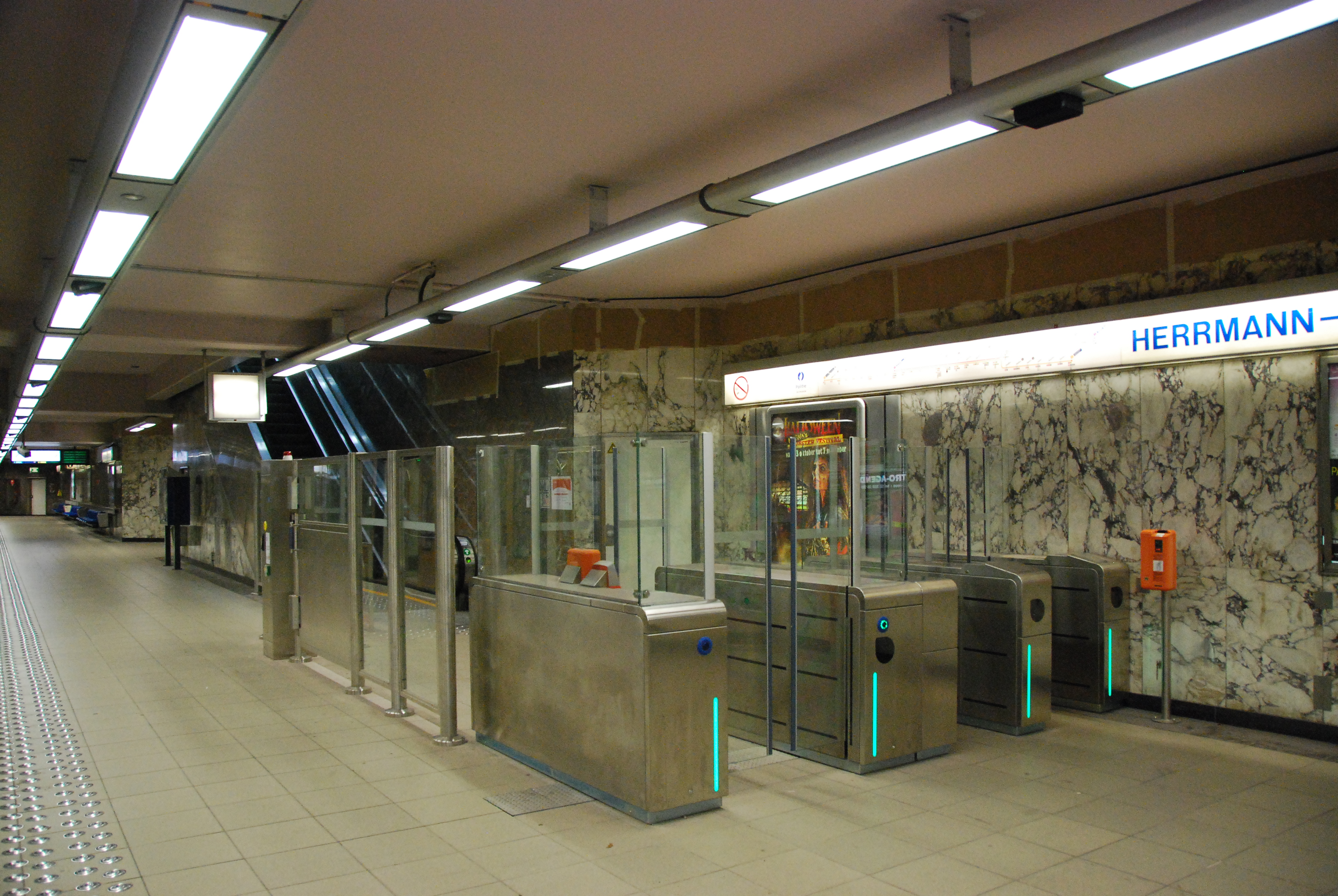 Portillons d'accès et de sortie du métro de Bruxelles : portillon à deux vantaux à effacement latéral